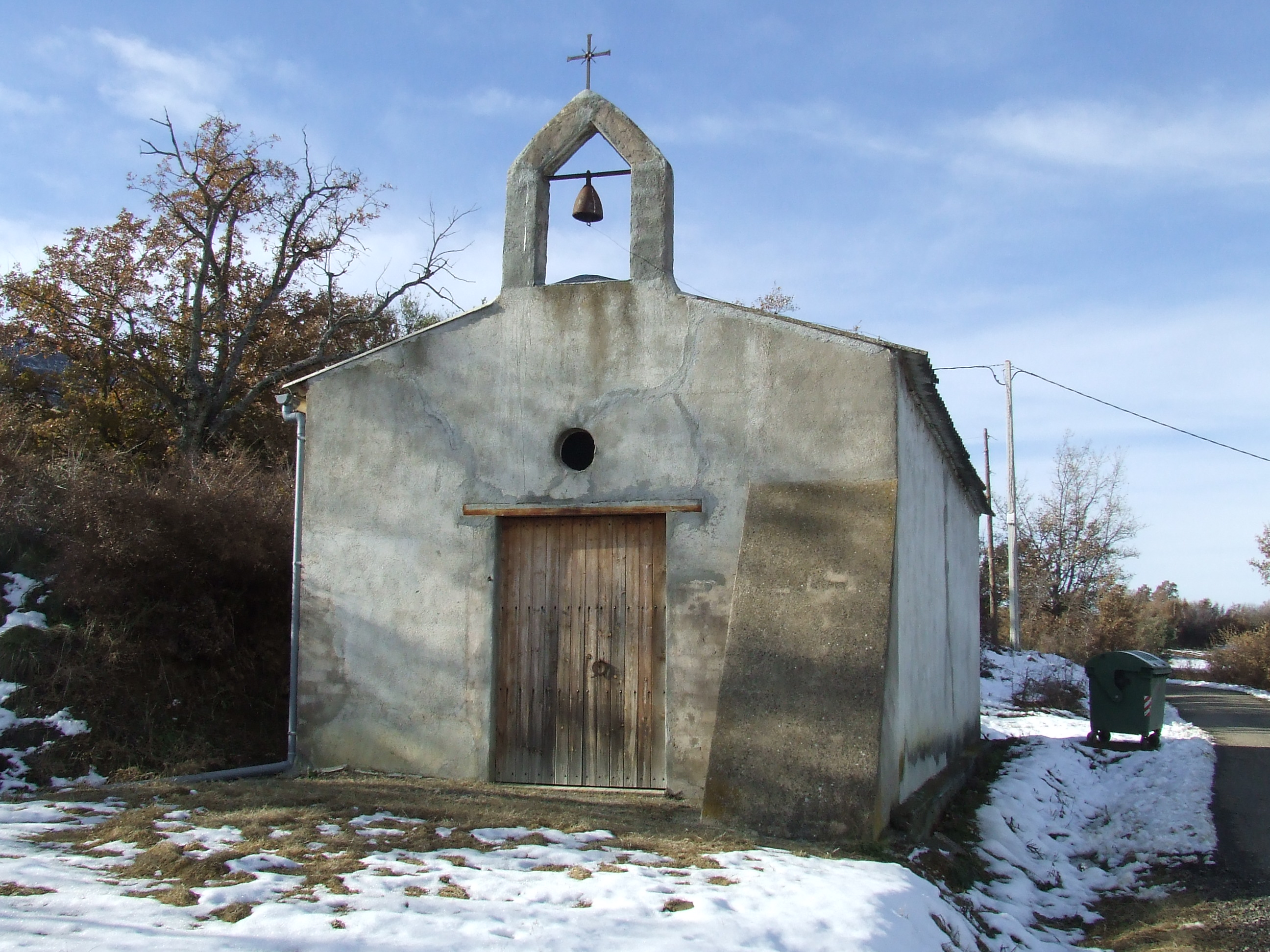 L'església nova de Sant Urbà dels Obacs de Llimiana (Els Obacs de Llimiana, Llimiana, Pallars Jussà)